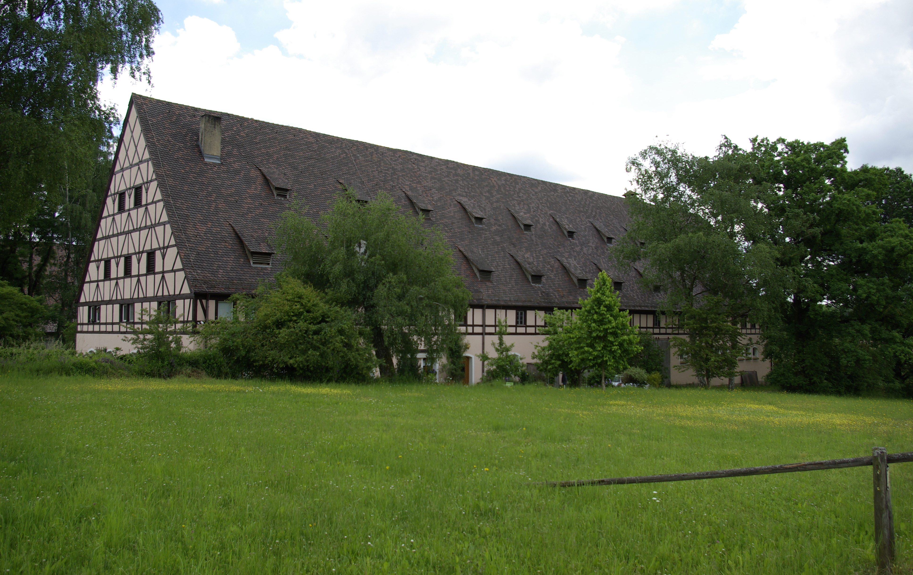 Pleikershof. Westliches Ökonomiegebäude. Blick von Nordwesten.